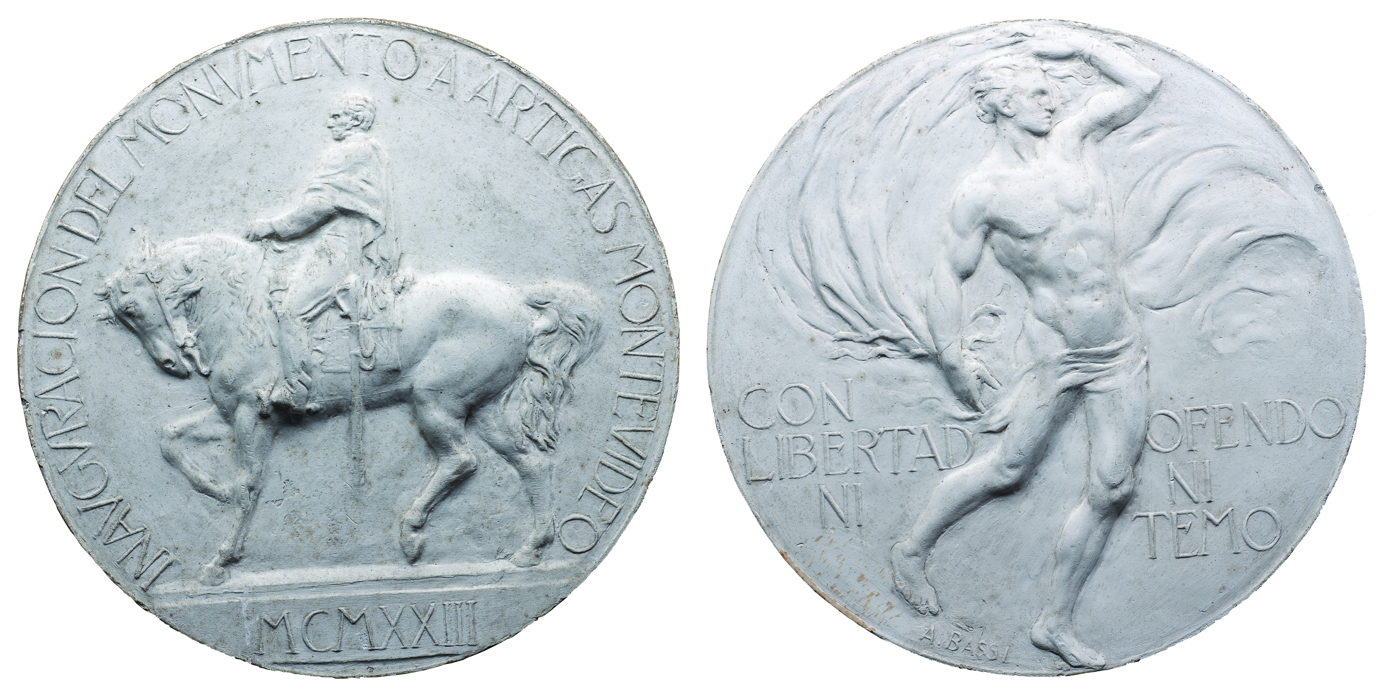 Archivo provisto por el Museo Histórico Nacional de Uruguay en el marco de un proyecto GLAM entre esa institución y Wikimedia Uruguay.